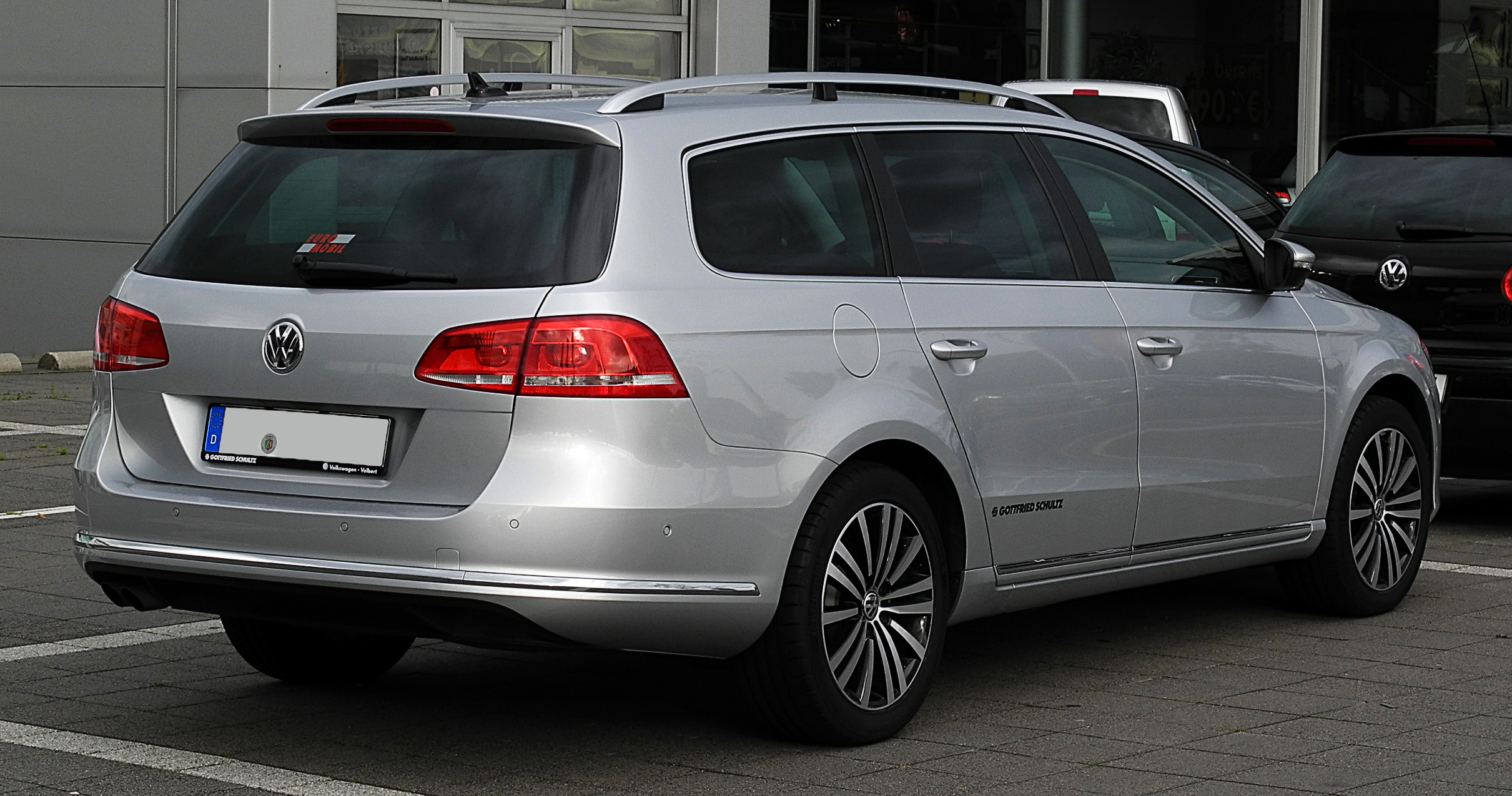 VW Passat Variant (B7)